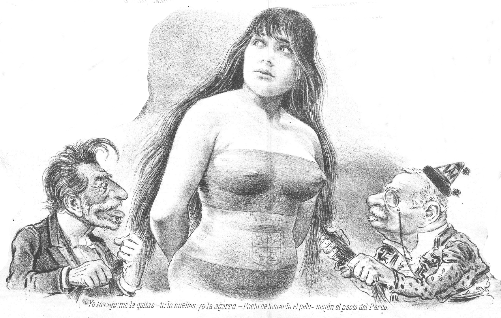 Yo la cojo, me la quitas - tú la sueltas, yo la agarro - Pacto de tomarla el pelo - según el pacto del Pardo, ilustración en la revista satírica española Don Quijote.